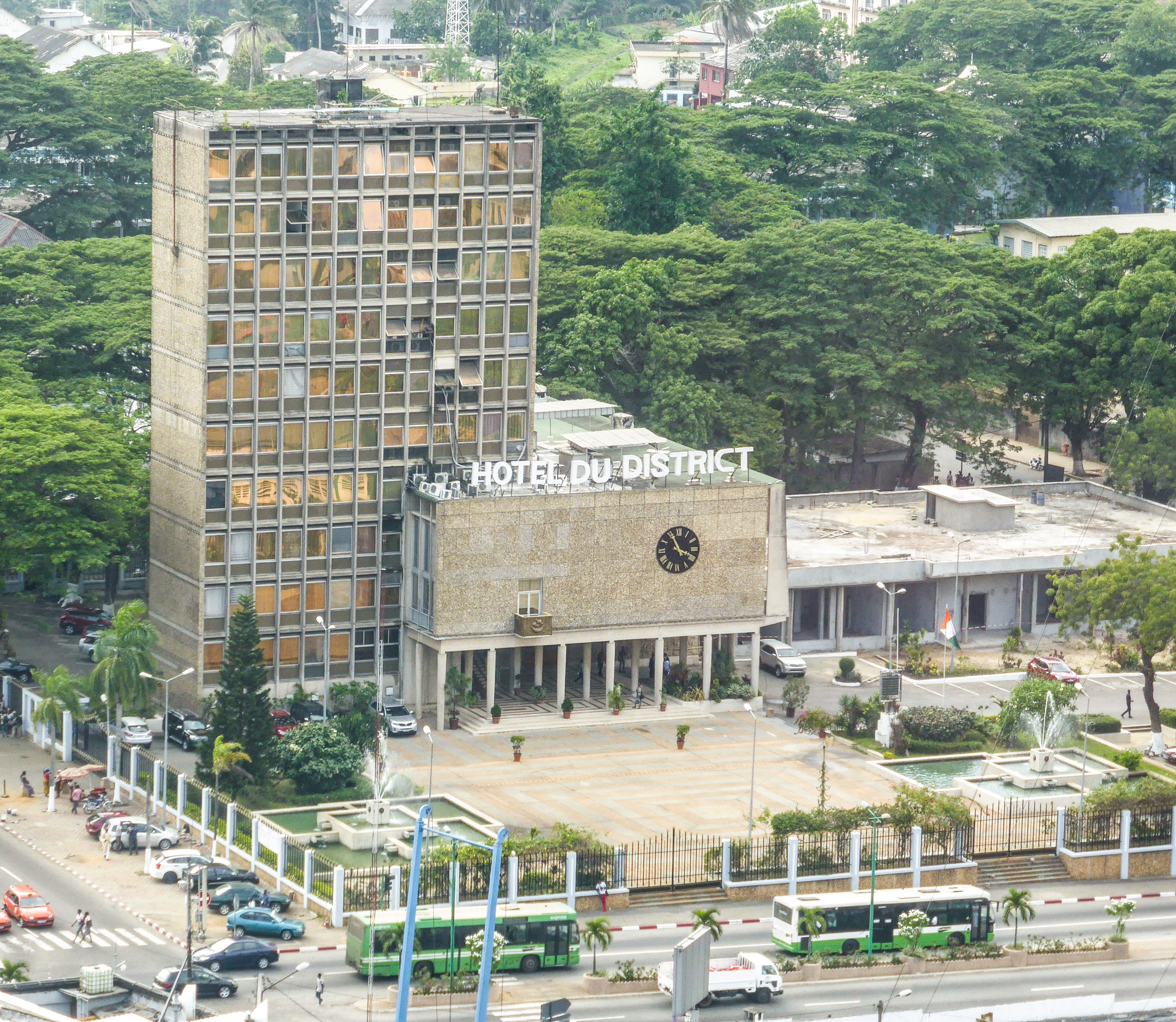 Hotel de ville d'Abidjan au plateau